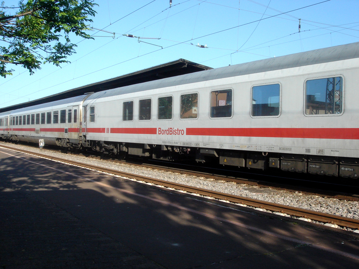 BordBistro eines InterCitys